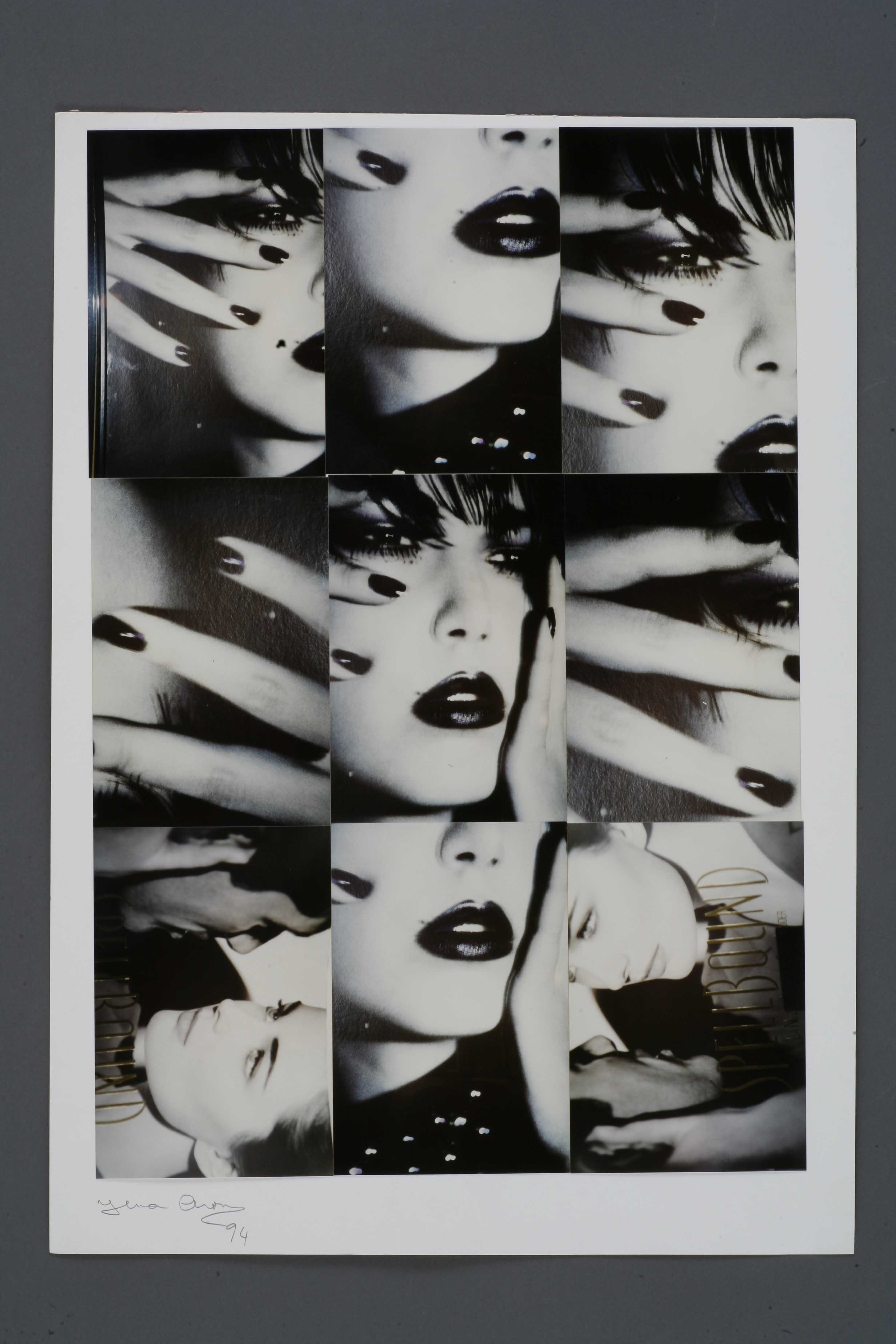 קולאז', עבודה של האמנית אילונה אהרון